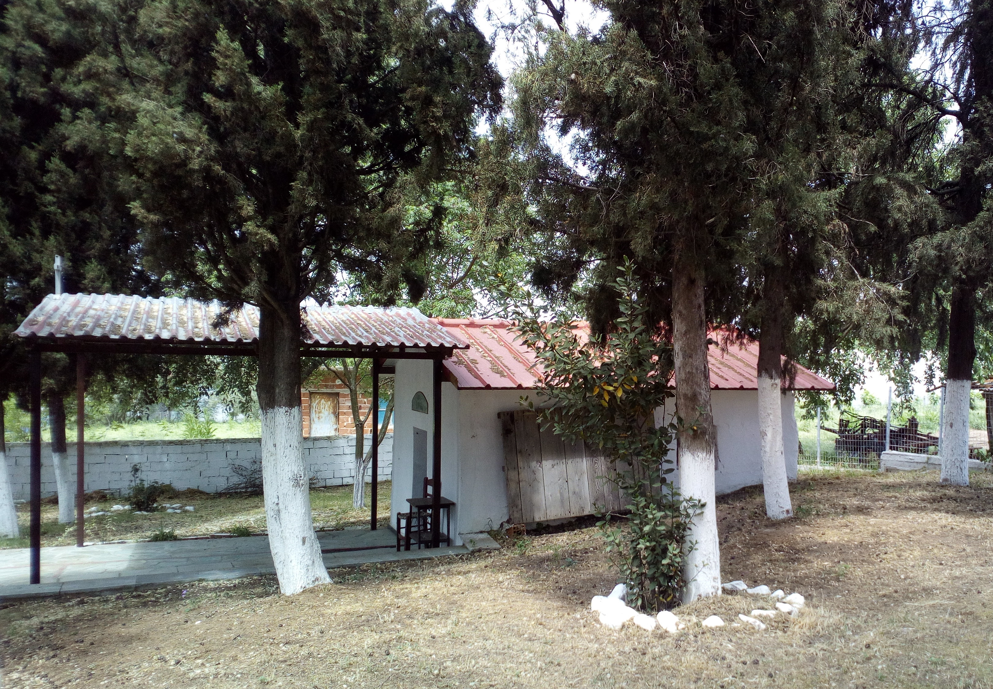 Παλιό εκκλησάκι χτισμένο πάνω σε παλαιότερα ερείπια.